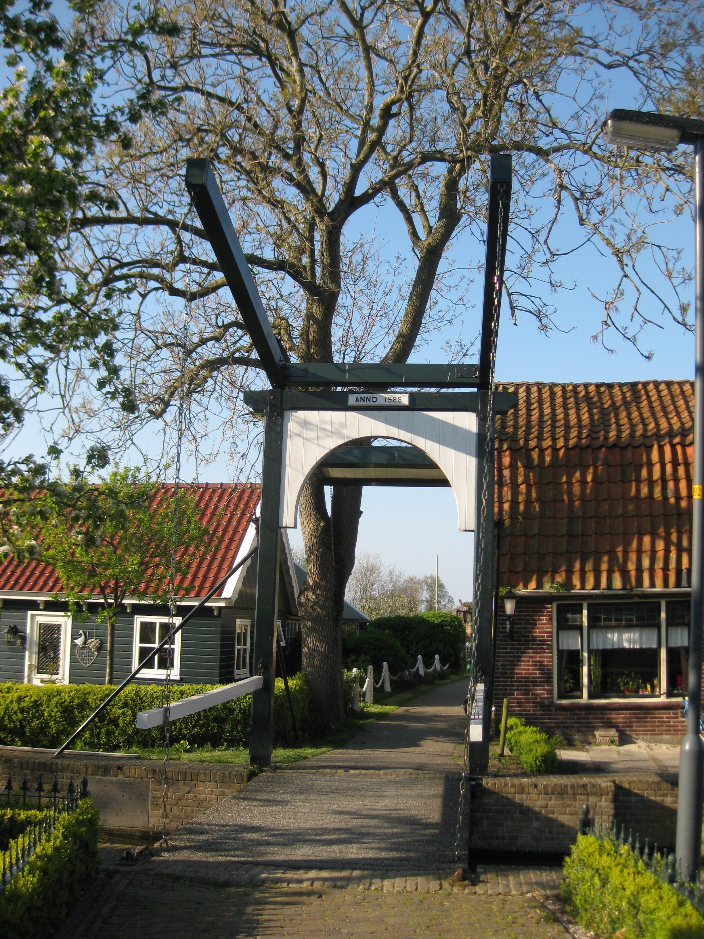 Ophaalbrug in De Woude, gemeente Castricum